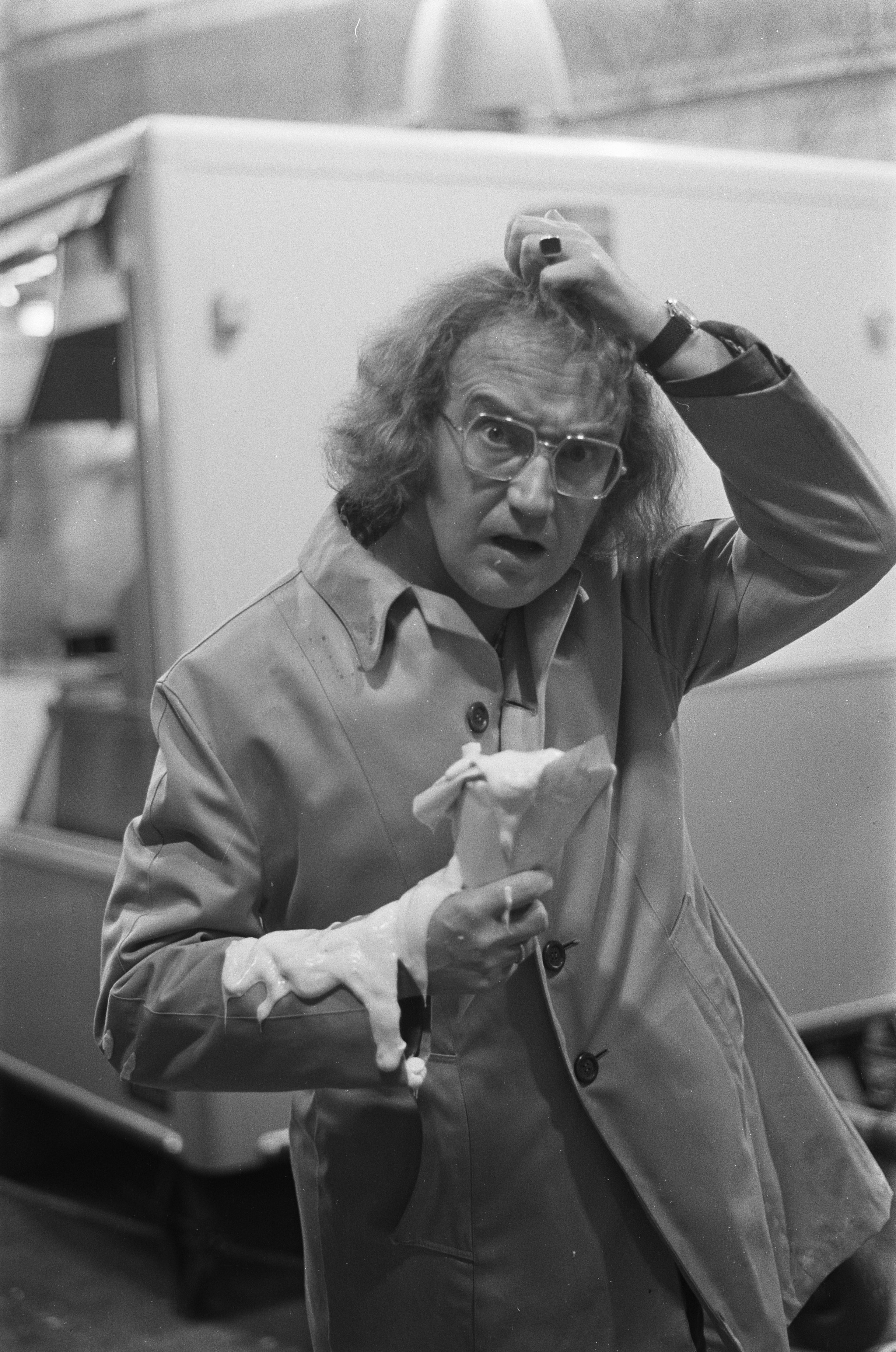 Collectie / Archief : Fotocollectie Anefo Reportage / Serie : [ onbekend ] Beschrijving : Opnamen voor TV-show Barend Servet, IJf Blokker als Barend Servet met zak patat Datum : 20 december 1972 Trefwoorden : TV-shows, patat Persoonsnaam : Blokker, IJf, Servet, Barend Fotograaf : Peters, Hans / Anefo Auteursrechthebbende : Nationaal Archief Materiaalsoort : Negatief (zwart/wit) Nummer archiefinventaris : bekijk toegang 2.24.01.05 Bestanddeelnummer : 926-1159